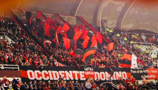 Barra de hinchas de Melgar que para en la tribuna occidente alto